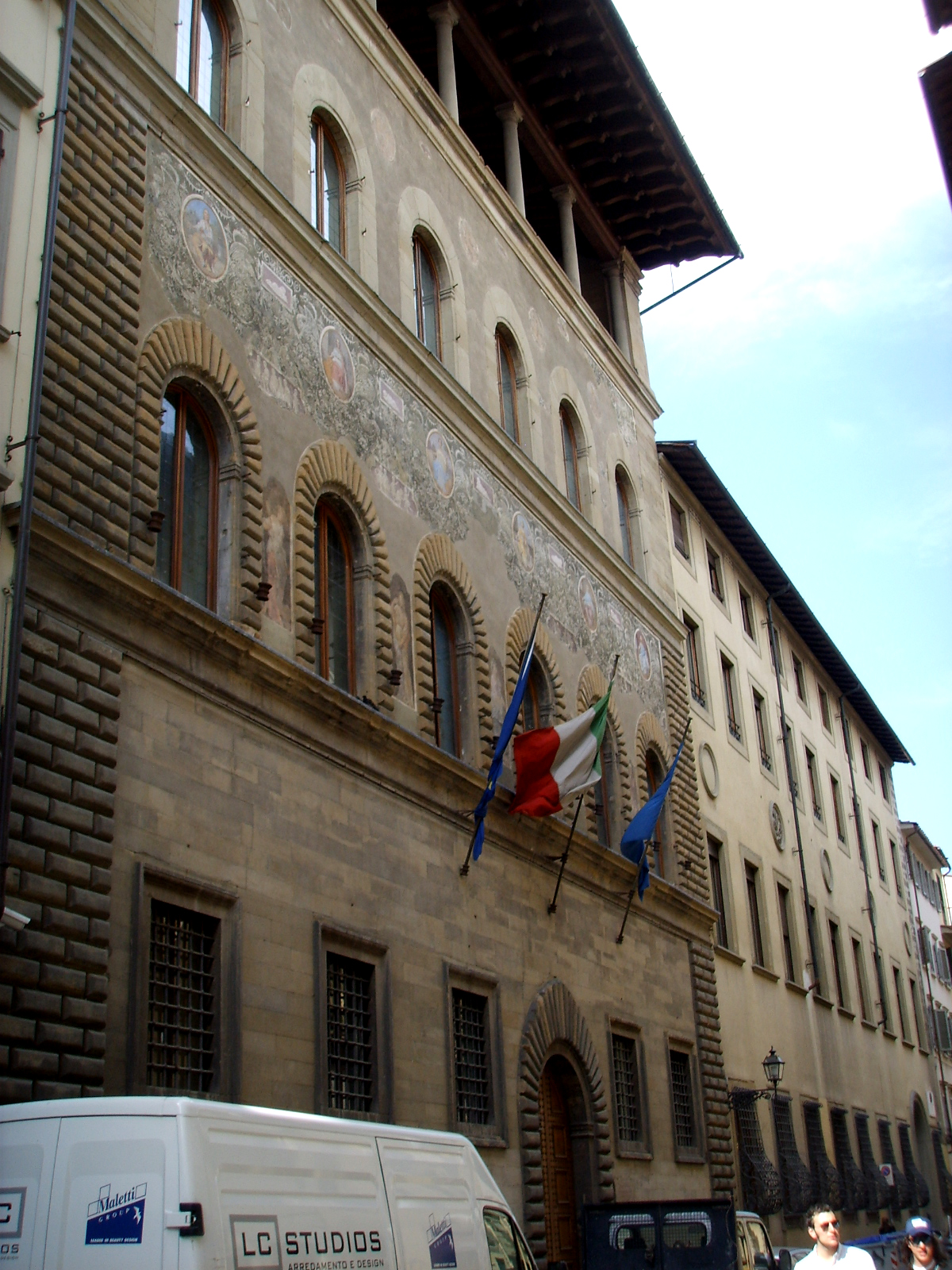 Palazzo_Niccolini in Florence